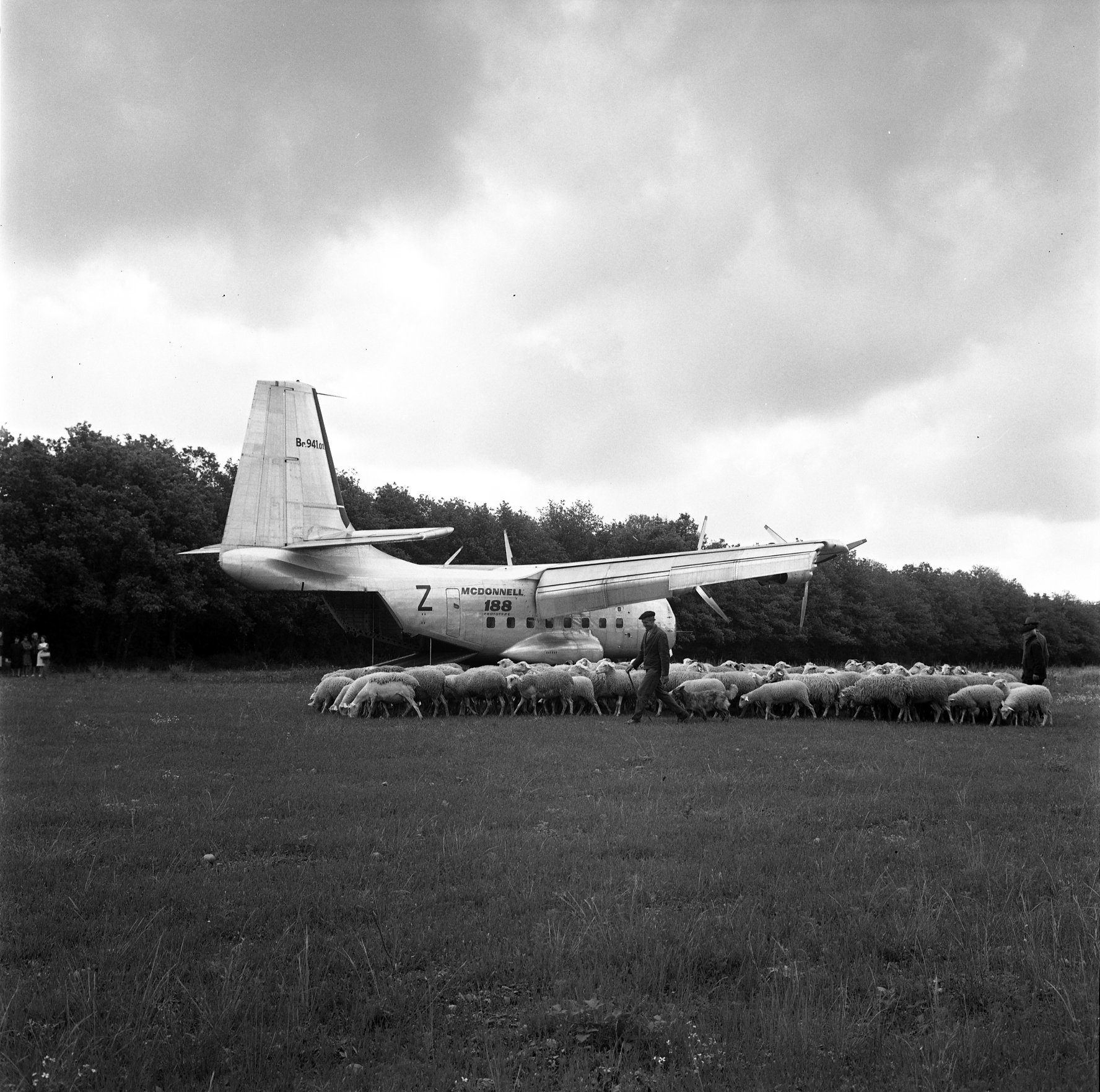 Forêt de Bouconne. 24 mai 1965. Vue d'ensemble de côté de l'avion Bréguet 941 stationné dans un champs en bordure de forêt ; à côté de l'appareil troupeau de moutons et berger.